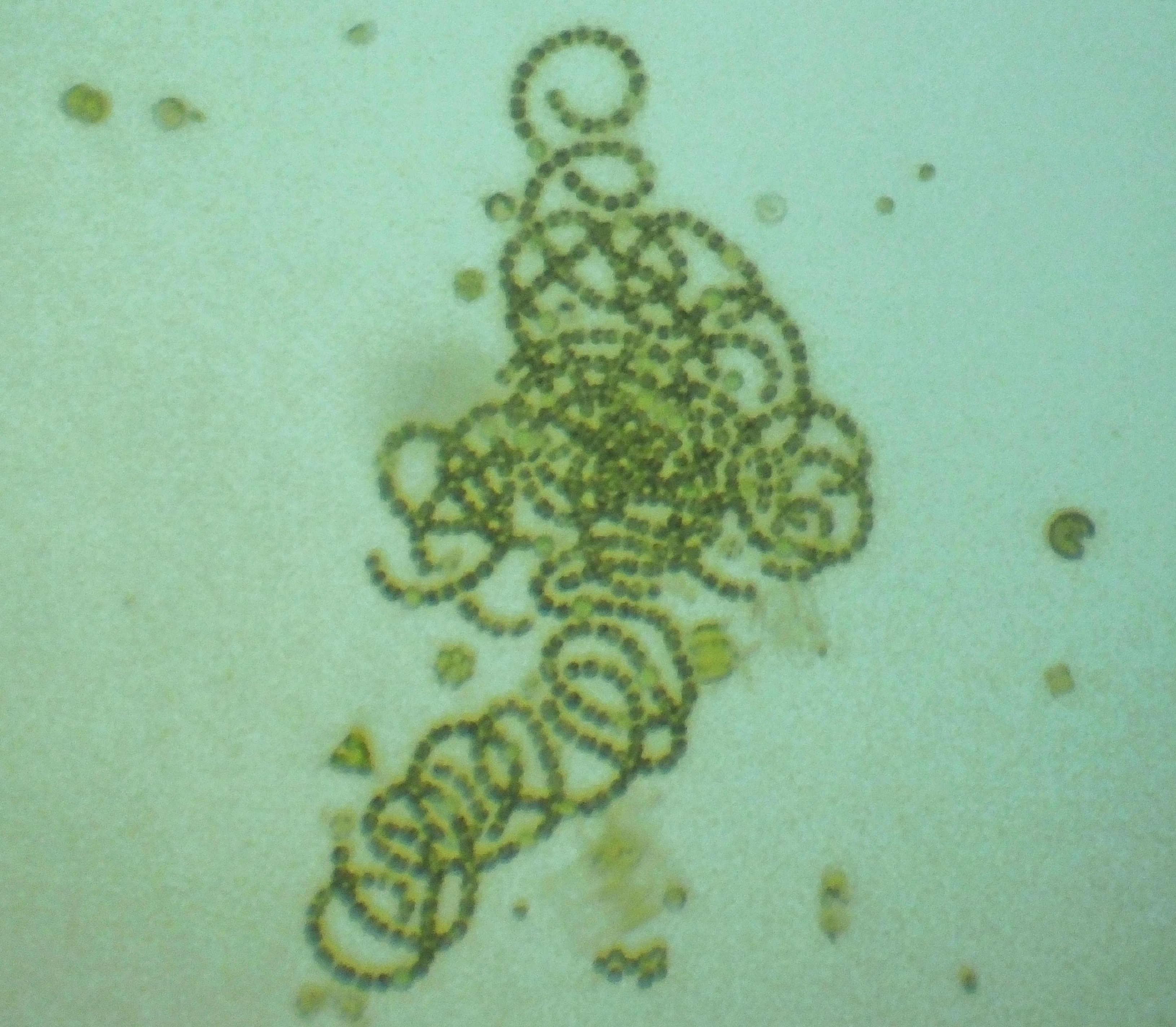 Dolichospermum crassum